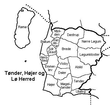 Tønder, Højer og Lø Herred, Tønder Amt, Danmark.